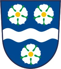 Bohuslavice (okres Opava)